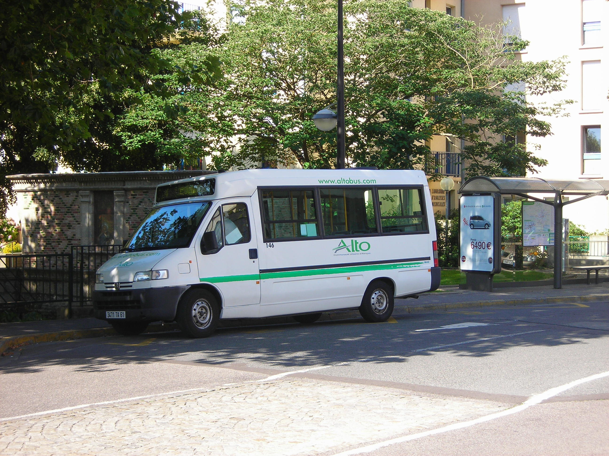 Minibus Peugeot Boxer Durisotti du résaux Alto a l'arrêt Pont neuf de la ligne 4 à Alençon (Orne, France).